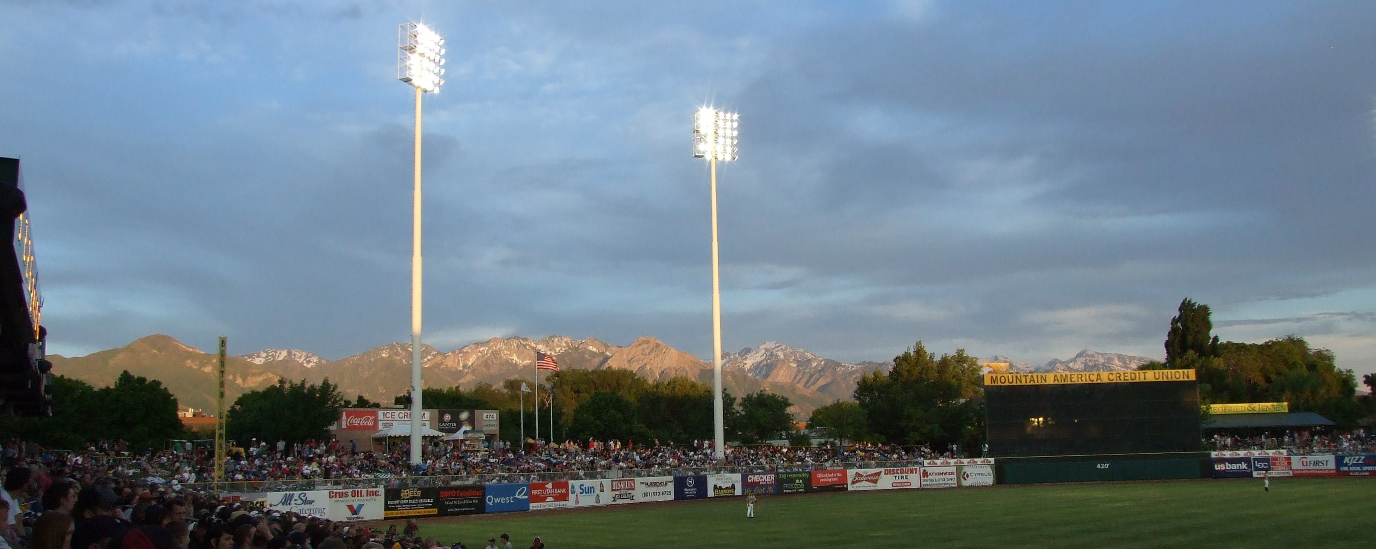 Sunset at Spring Mobile Ballpark.